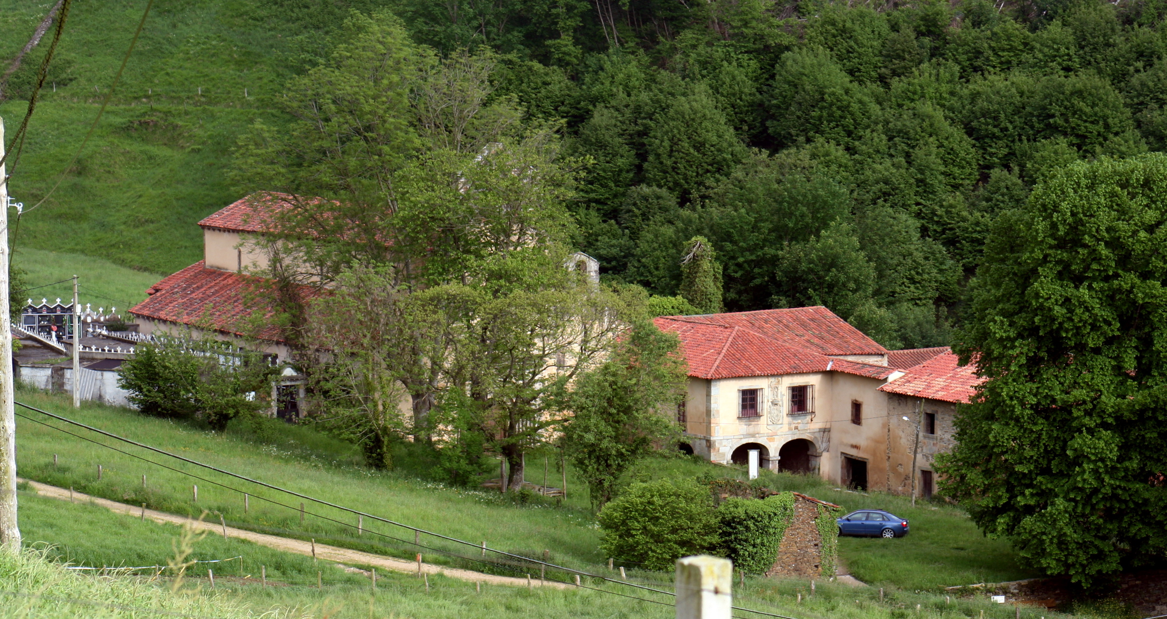 Santa María la Real de Obona